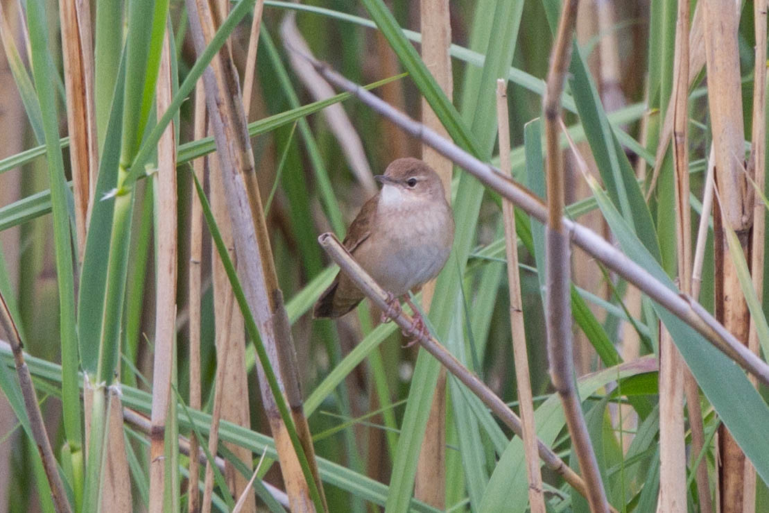 Savi's Warbler (Locustella luscinioides)